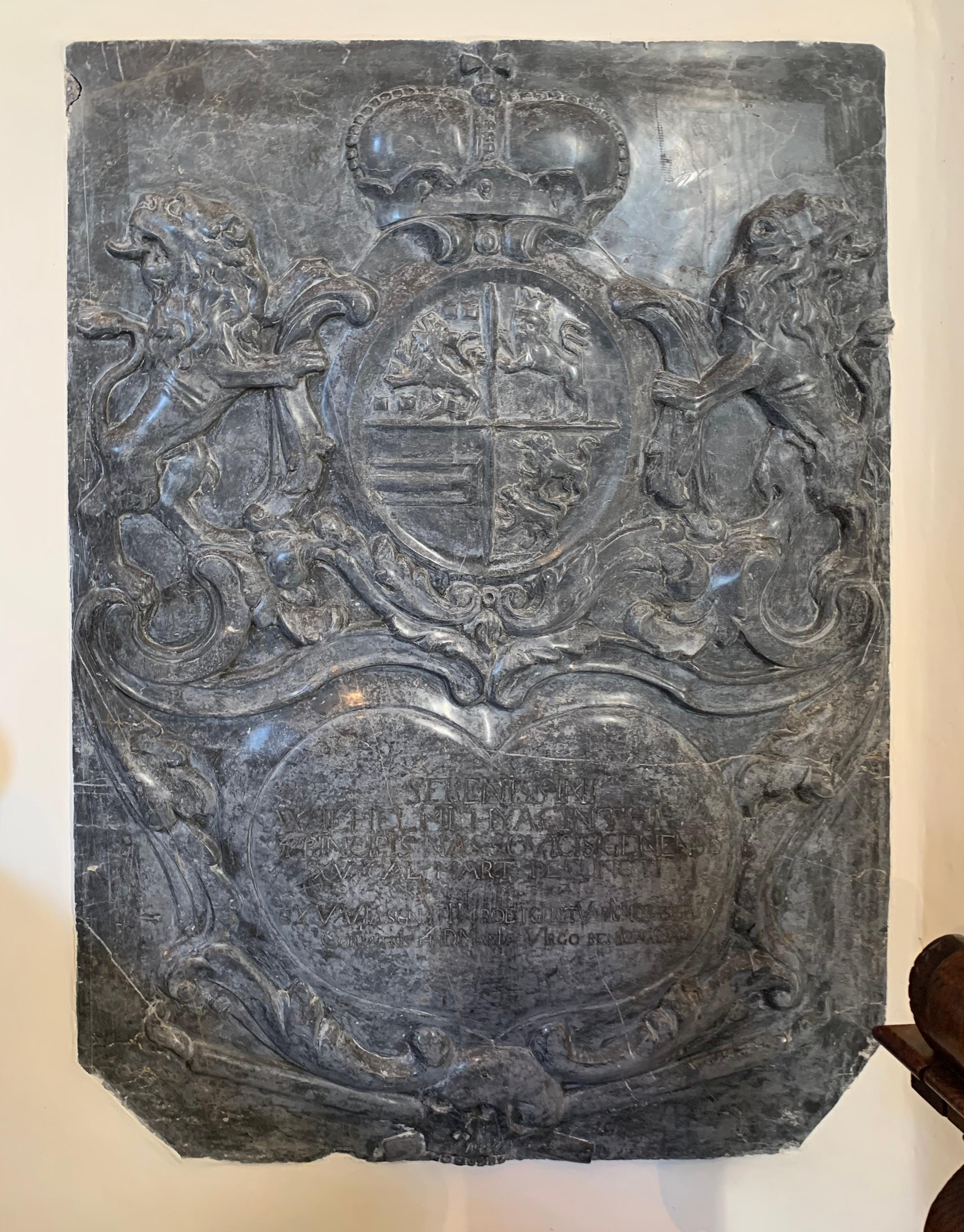 Hadamar, Herzenbergkapelle, Epitaph Wilhelm Hyacinth von Nassau-Siegen